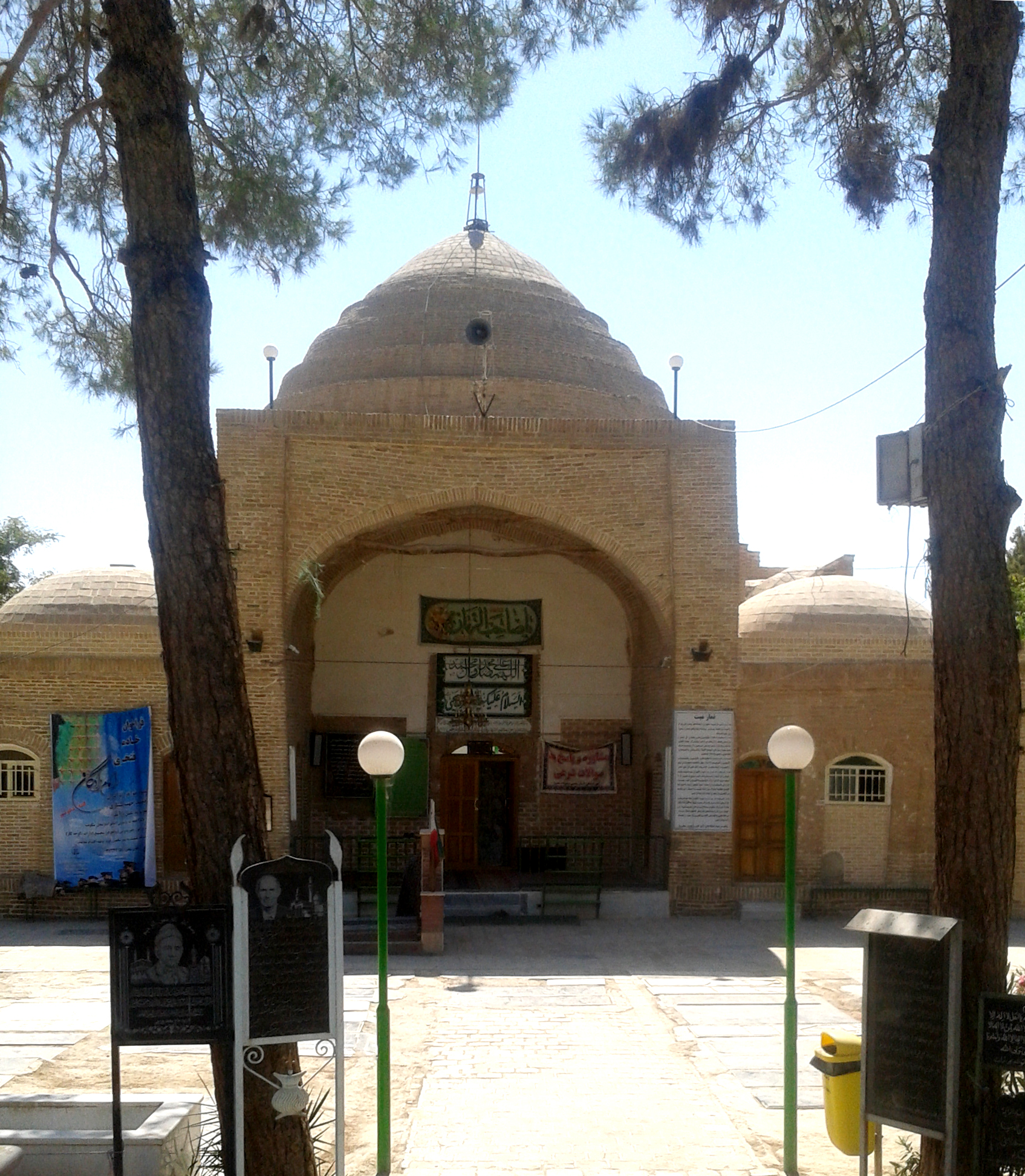 امامزاده یحیی